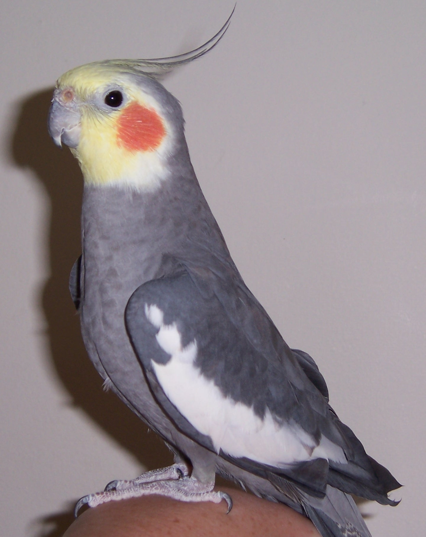 Male Cockatiel